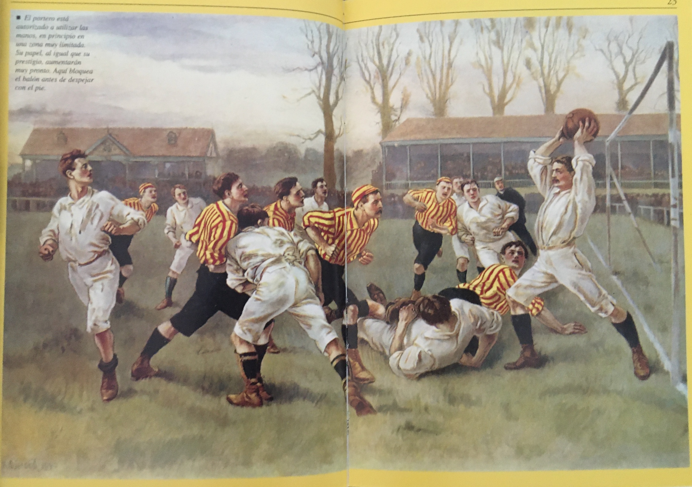 Partido en Inglaterra, viñeta en colores, el portero vuelve a poner la pelota en juego; los años 1890. — Alfred Wahl, Historia del fútbol, del juego al deporte (pp. 22–23), colección «Biblioteca de bolsillo CLAVES» (nº 5), serie Deportes. Barcelona: Ediciones B, octubre 1997. Traducido del francés por Francesc Reyes; breve descripción en la página 155.